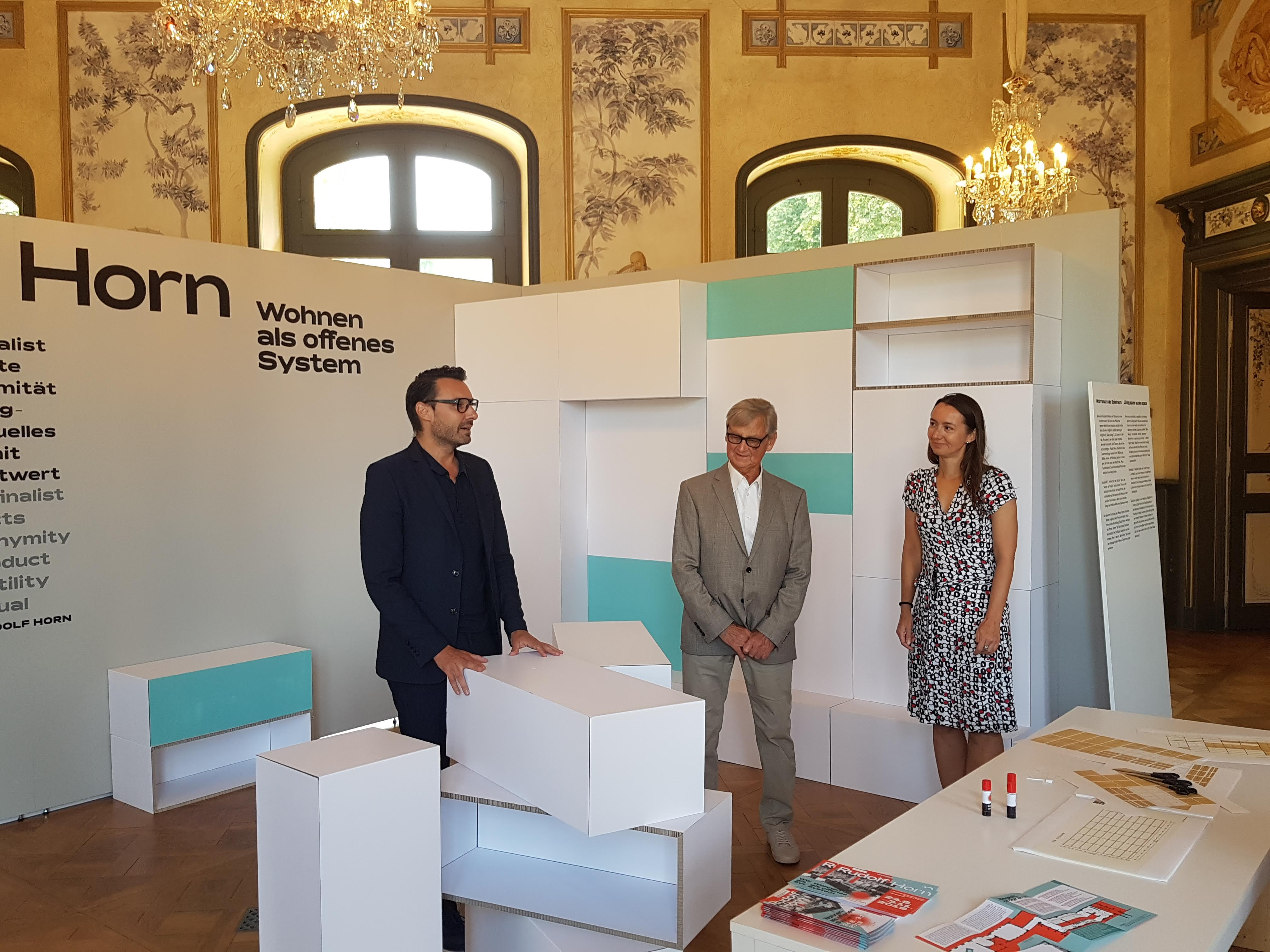 Rudolf Horn im August 2019 zur Eröffnung der Ausstellung "Rudolf Horn - Wohnen als offenes System" im Kunstgewerbemuseum der Staatlichen Kunstsammlungen Dresden in Pillnitz